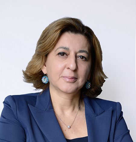 Barbara Morgante amministratore delegato di Trenitalia